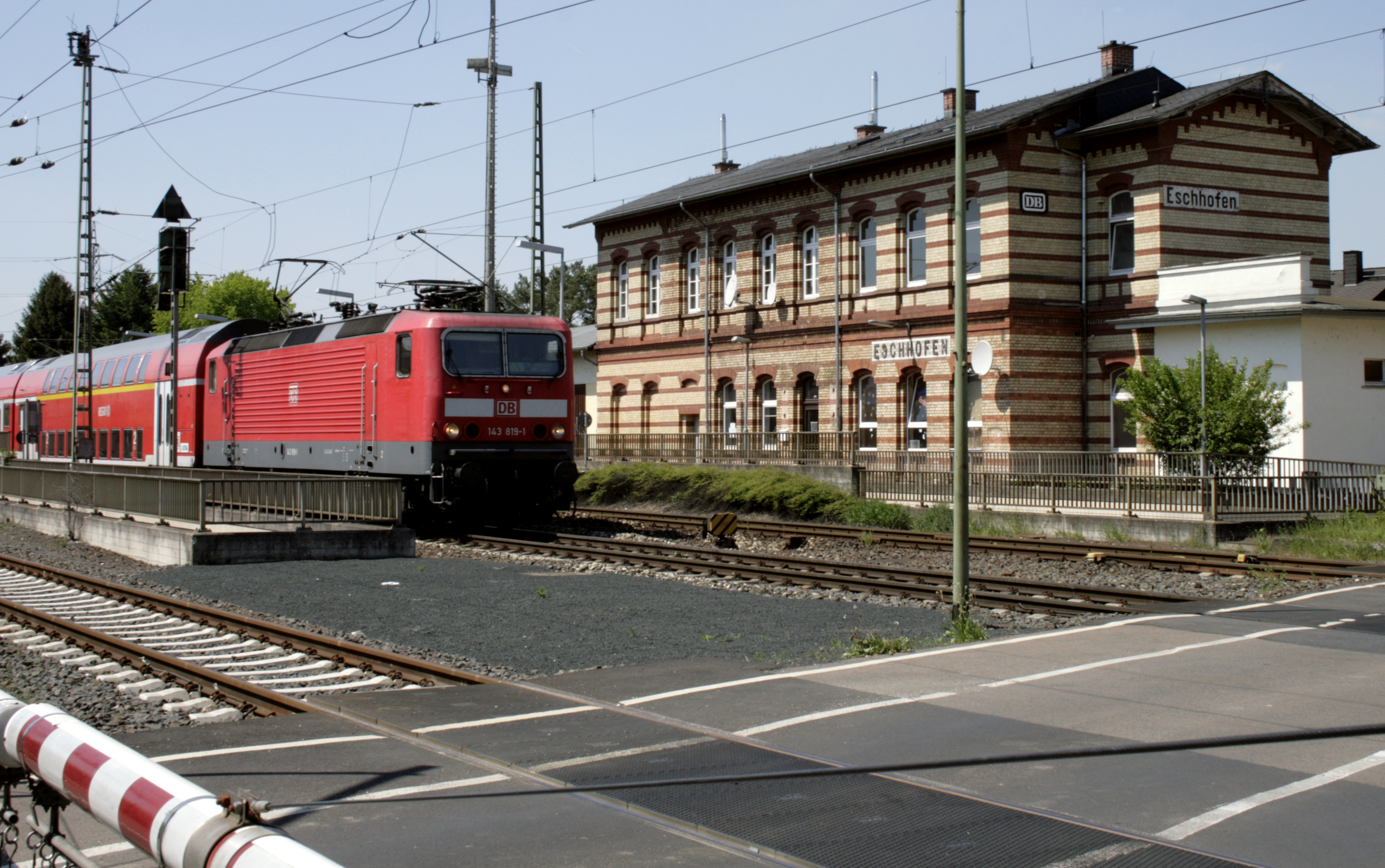 Bahnhof in Eschhofen, Deutschland